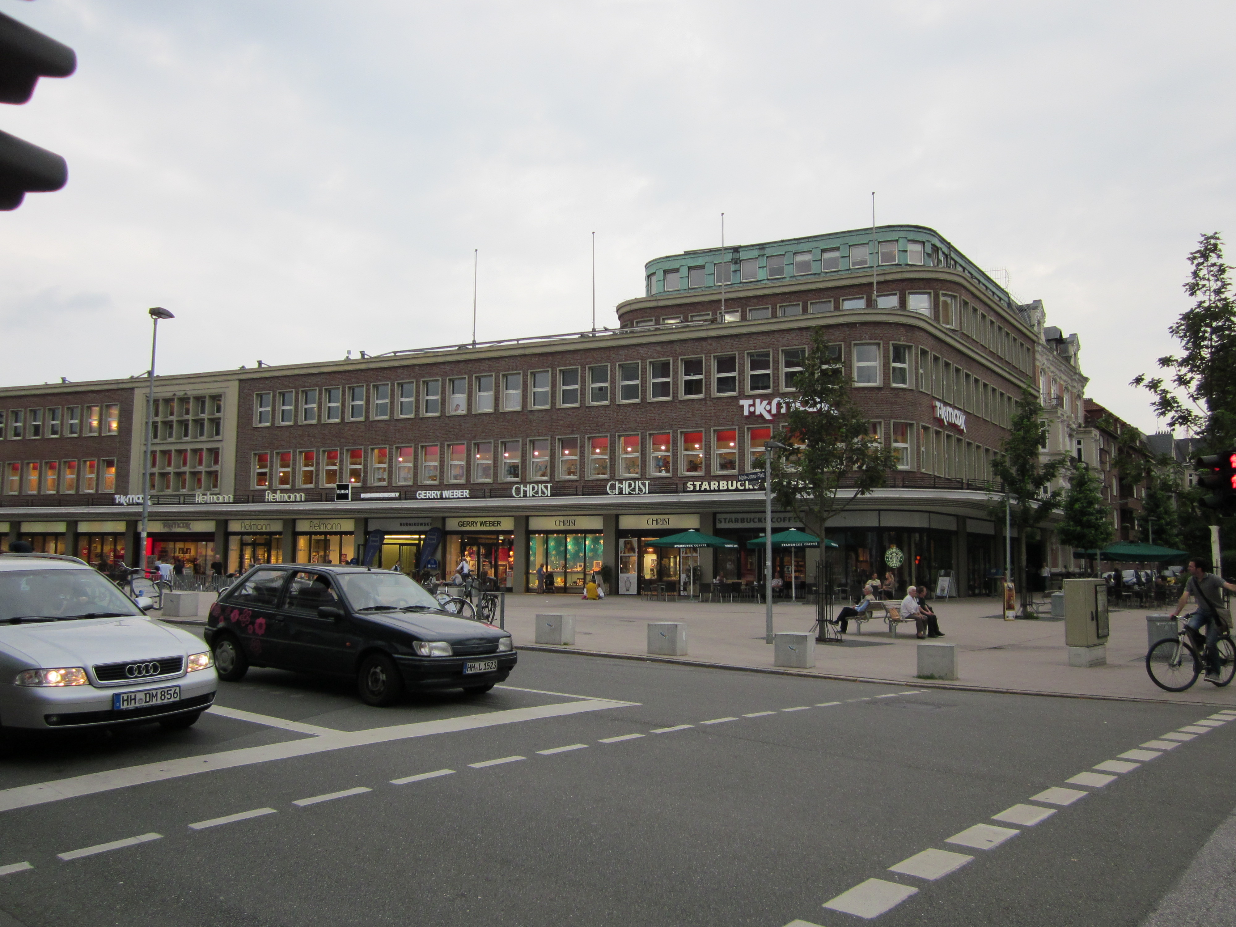 Das ehemalige Karstadt-Warenhaus am Marie-Jonas-Platz in Eppendorf wurde in den 1950er Jahren erbaut. Heute befinden sich verschiedene Einzelhändler im Gebäude.